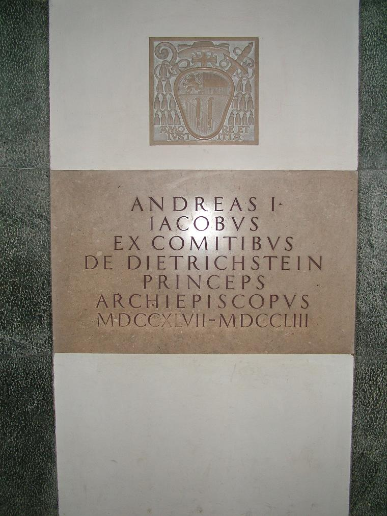 Salzburg, Grab von Erzbischof Dietrichstein in der Krypta des Salzburger Doms